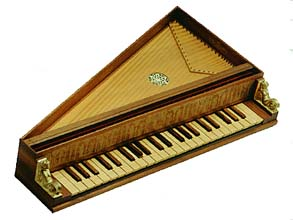 اسپینت